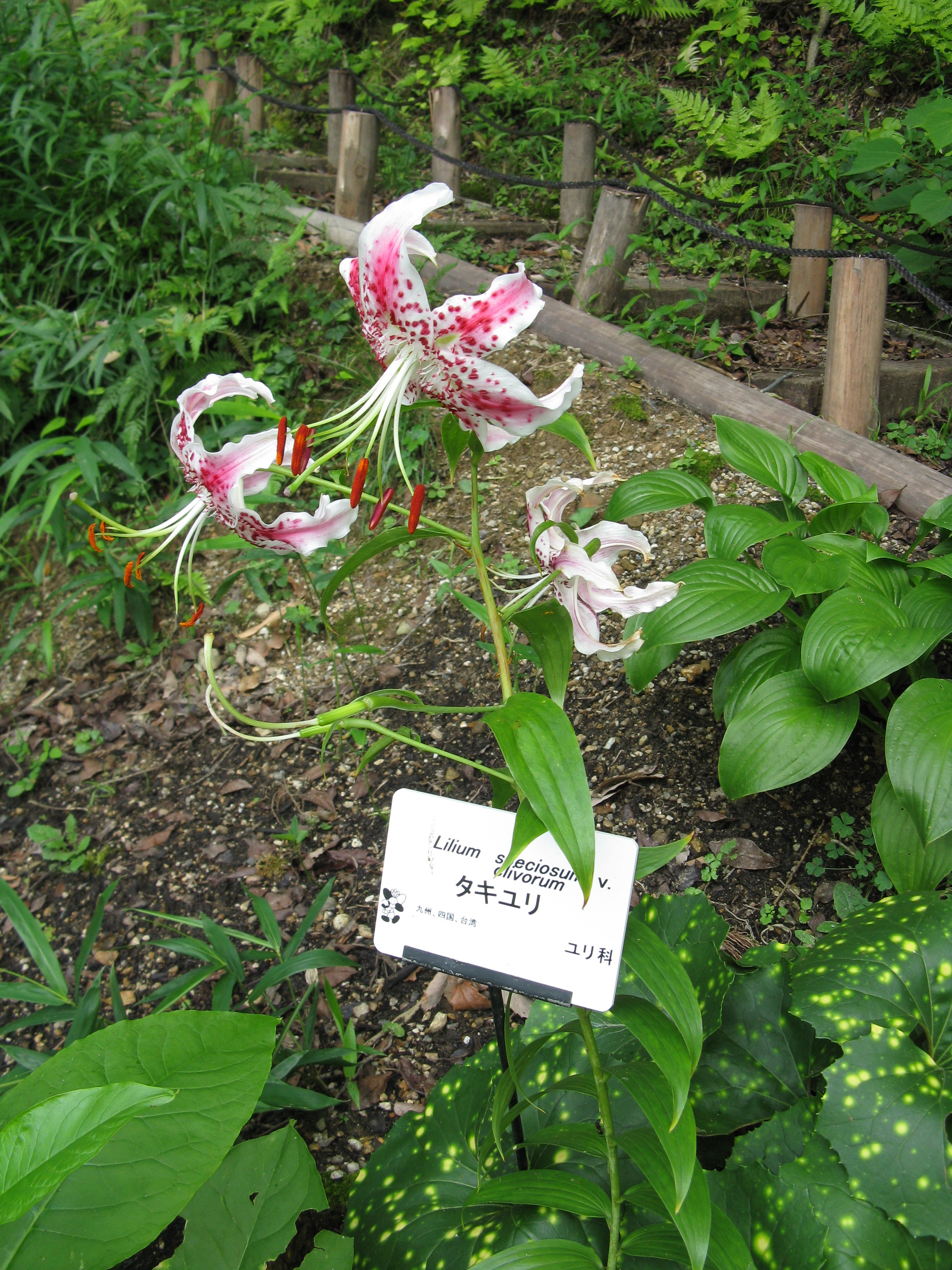 Lilium speciosum var. clivorum